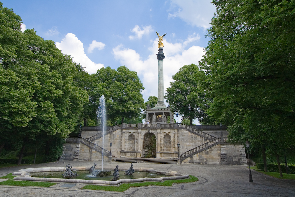 Friedensengel in München This is a photograph of an architectural monument.